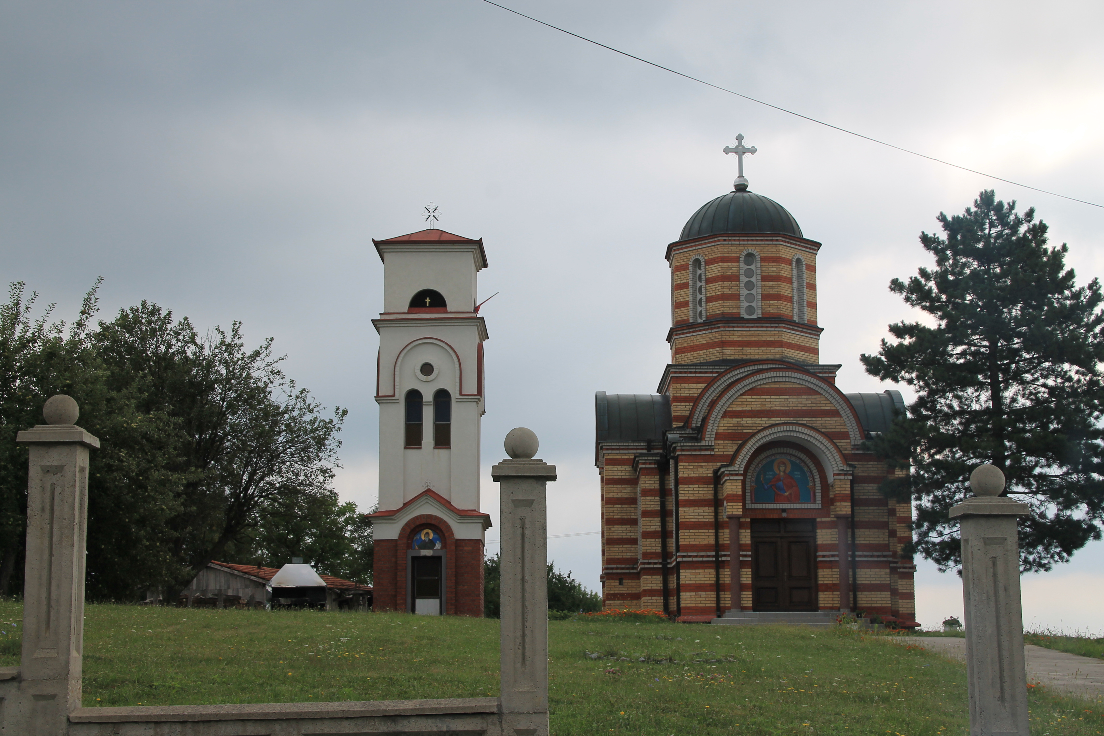 Crkva Sv. Marine (Gornja Sabanta)